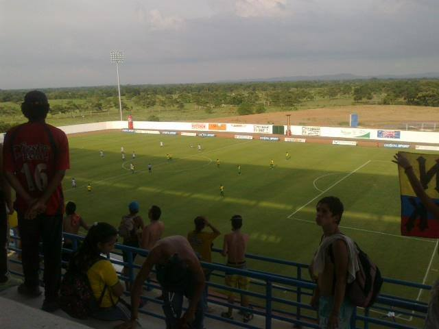 Estadio Municipal de Montería durante el encuentro Jaguares vs. Atlético Bucaramanga, décimo octava fecha del torneo Finalización, campeonato de Primera B 2013 de Colombia.